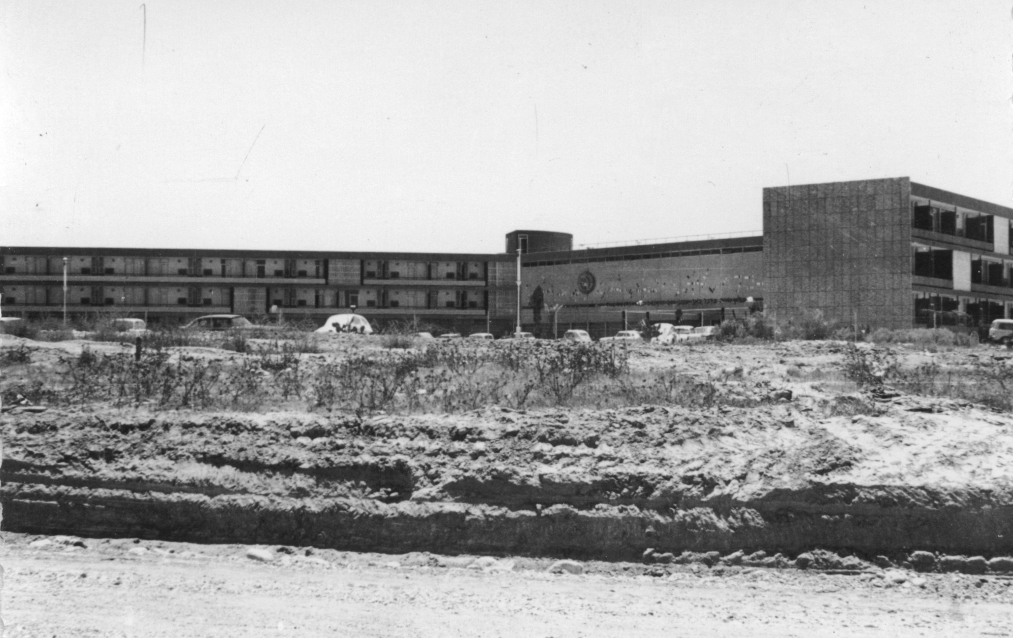 מלון נאות מדבר באר שבע